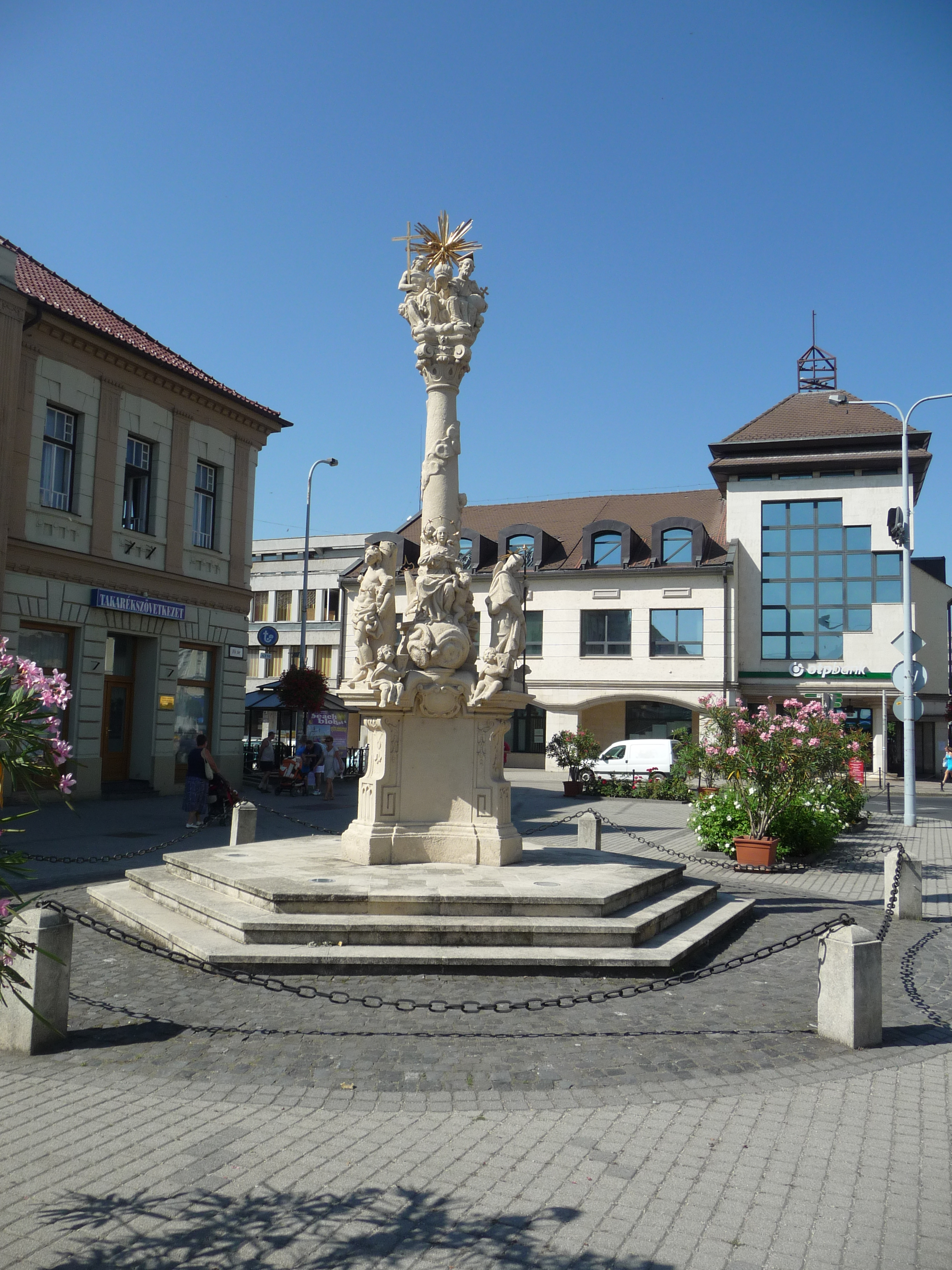 Szentháromság — szoborcsoport (Tapolca)